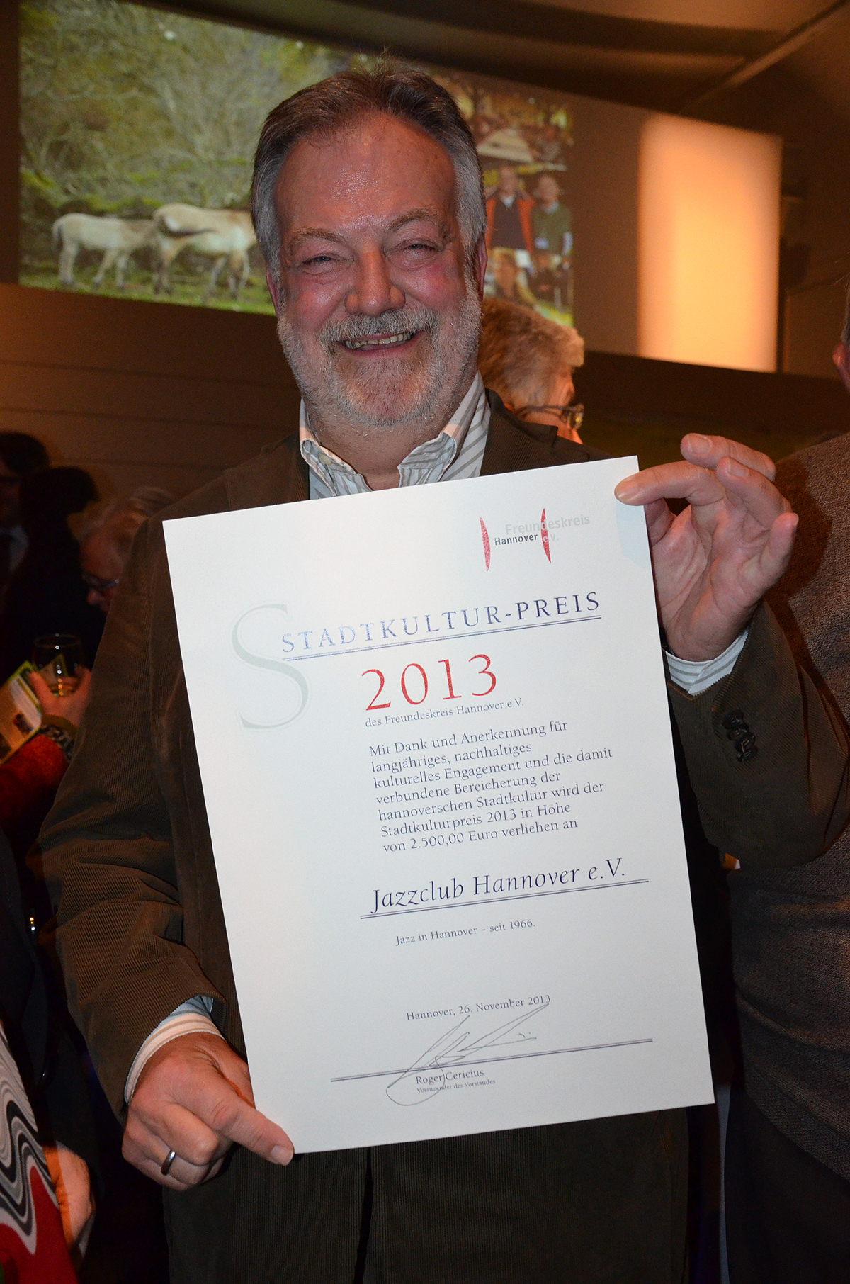 Zur den Feierlichkeiten der Verleihung des Stadtkulturpreises und des Sonderpreises für herausragendes bürgerschaftliches Engagement durch den Freundeskreis Hannover in der Orangerie des Großen Gartens in Herrenhausen erschienen zahlreiche Persönlichkeiten aus dem vielfältigen Leben rund um die niedersächsische Landeshauptstadt. Hier präsentiert Uwe Thedsen, Manager vom Jazz Club Hannover, auf Wunsch des Fotografen für alle Menschen dieser Welt noch einmal zum Mitlesen die verliehene Urkunde zum Stadtkulturpreis 2013 ...